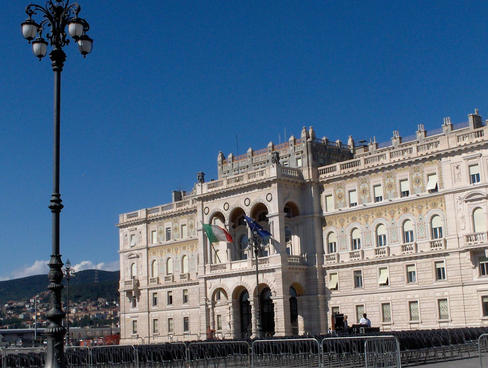 Palazzo del Governo, Piazza Unità d'Italia, Trieste